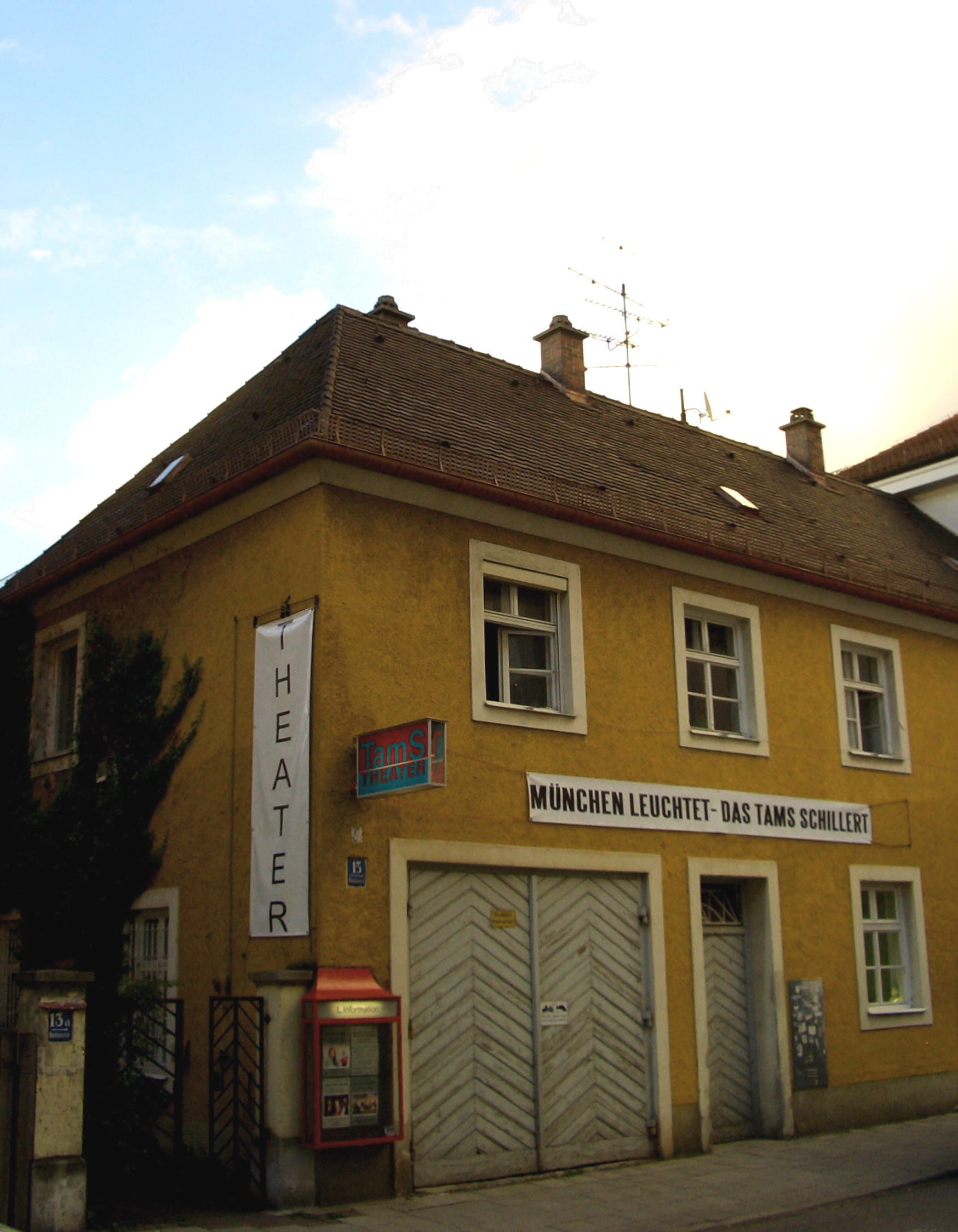 Theater am Sozialamt TamS München